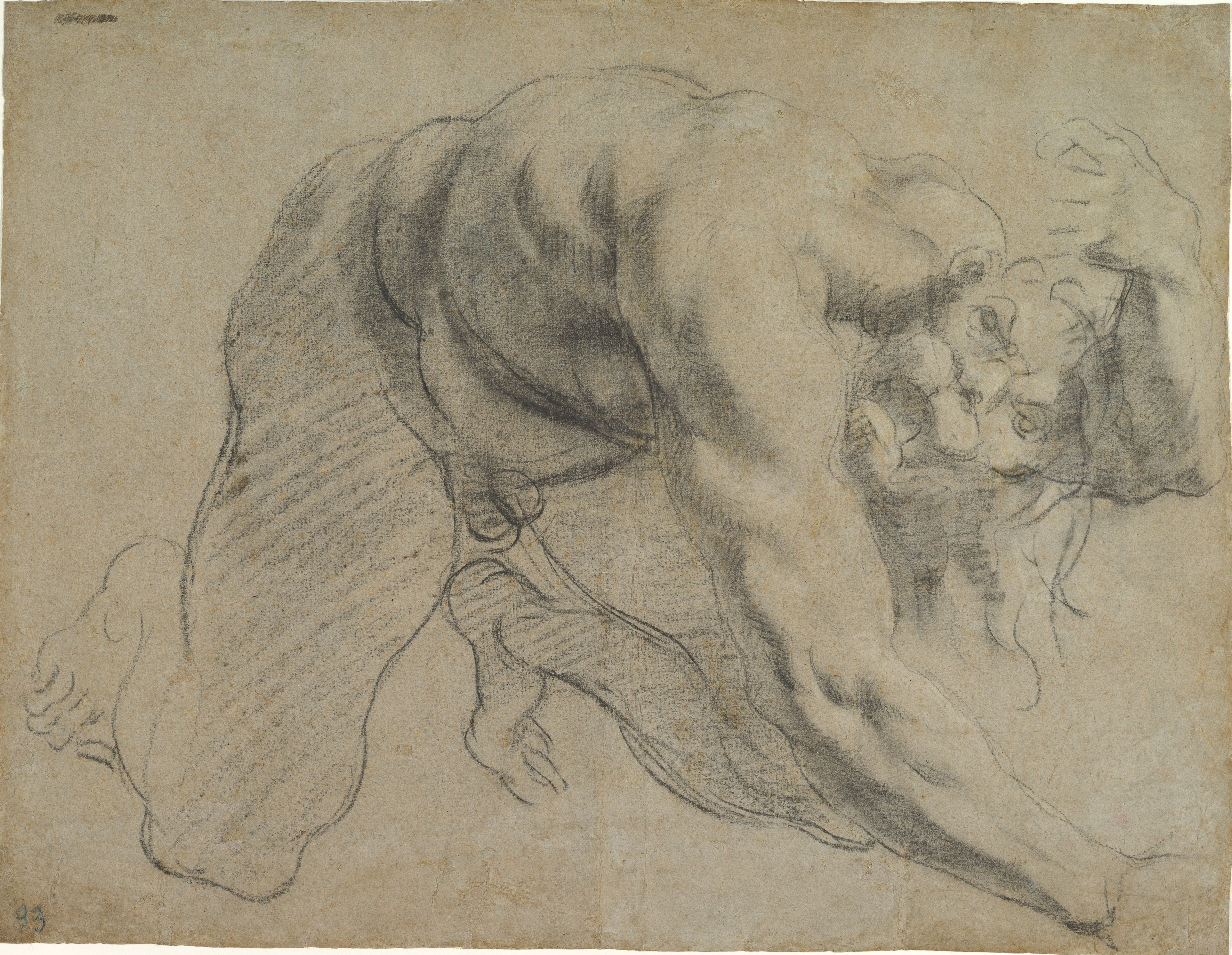 Caco